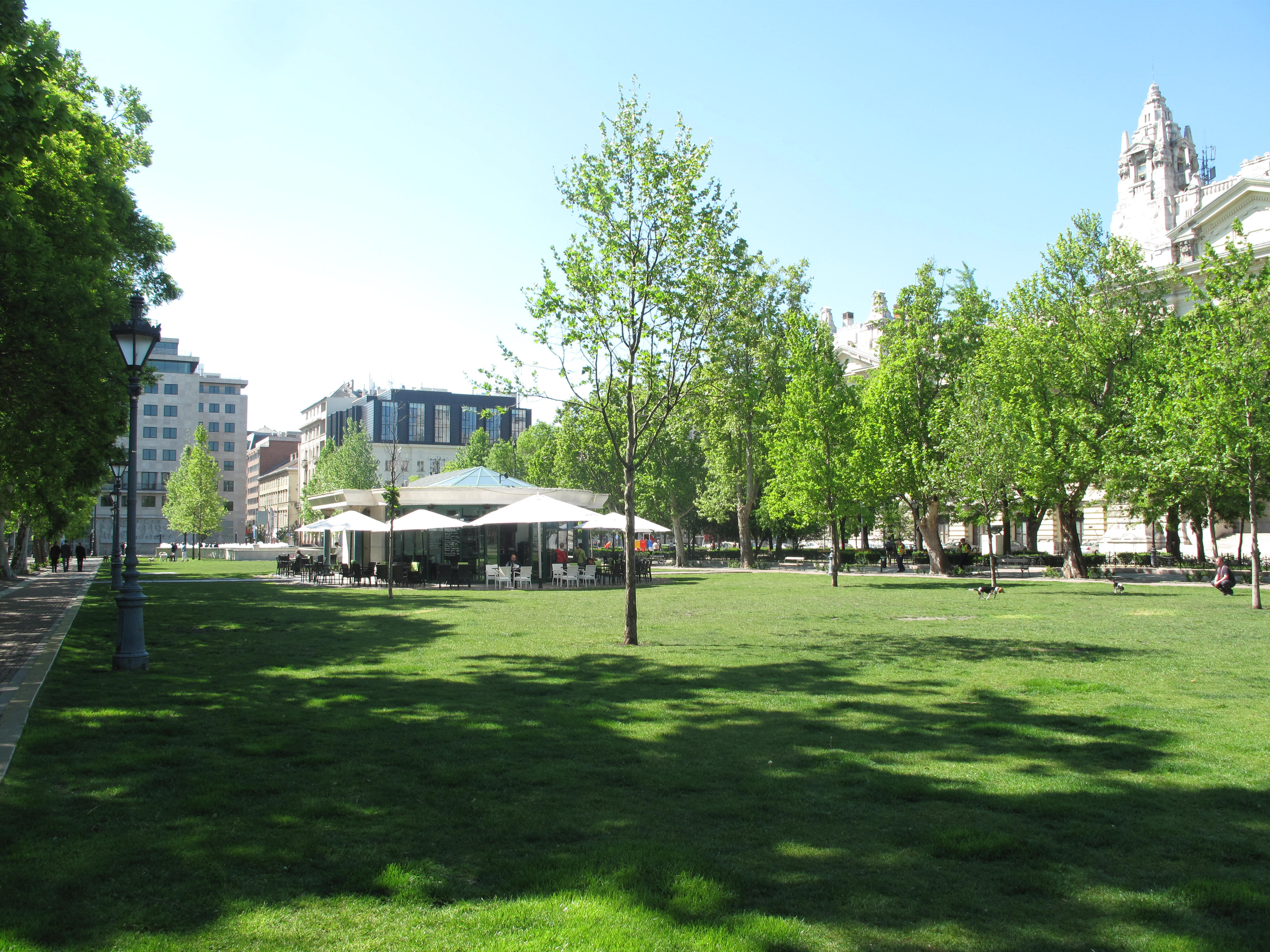 Budapešť